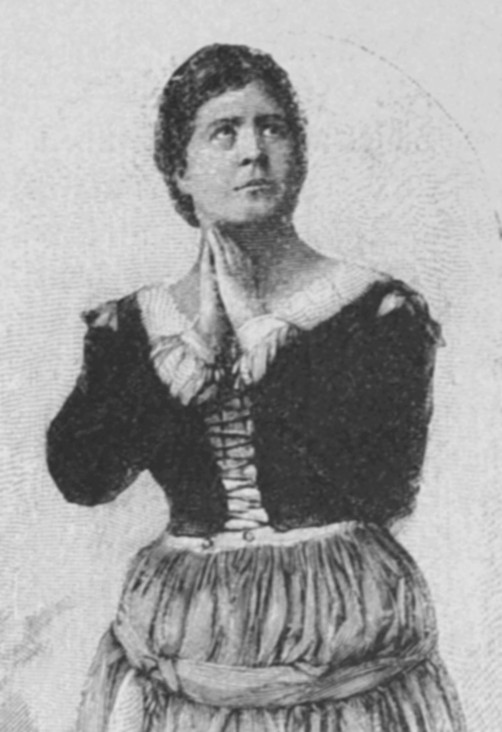 Anna Haverland als Jungfrau von Orleans